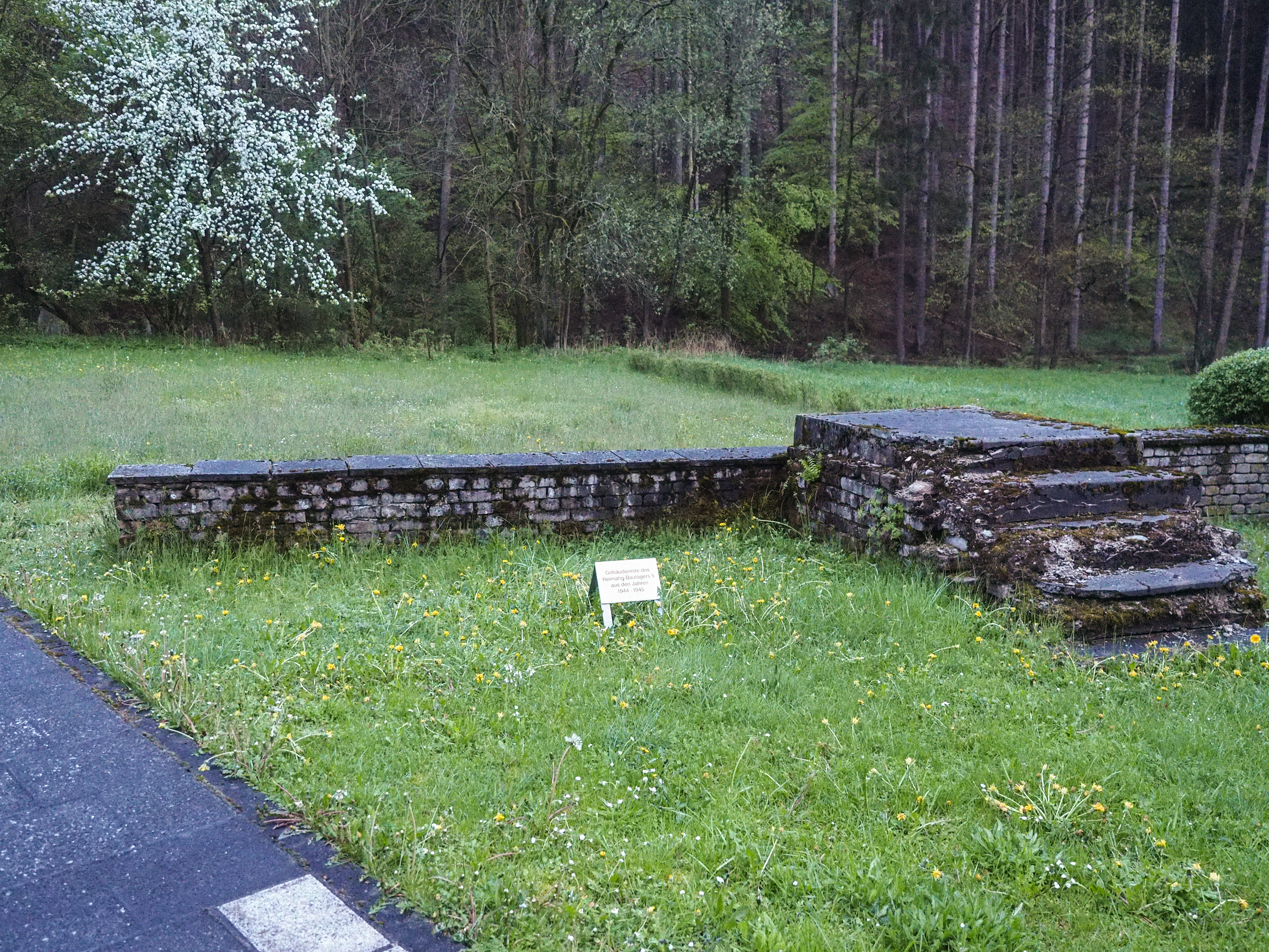 Gedenkstätte des Arbeitslagers Leubengrund, ehemalige Rüstungsfabrik REIMAHG bei Kahla, Thüringen